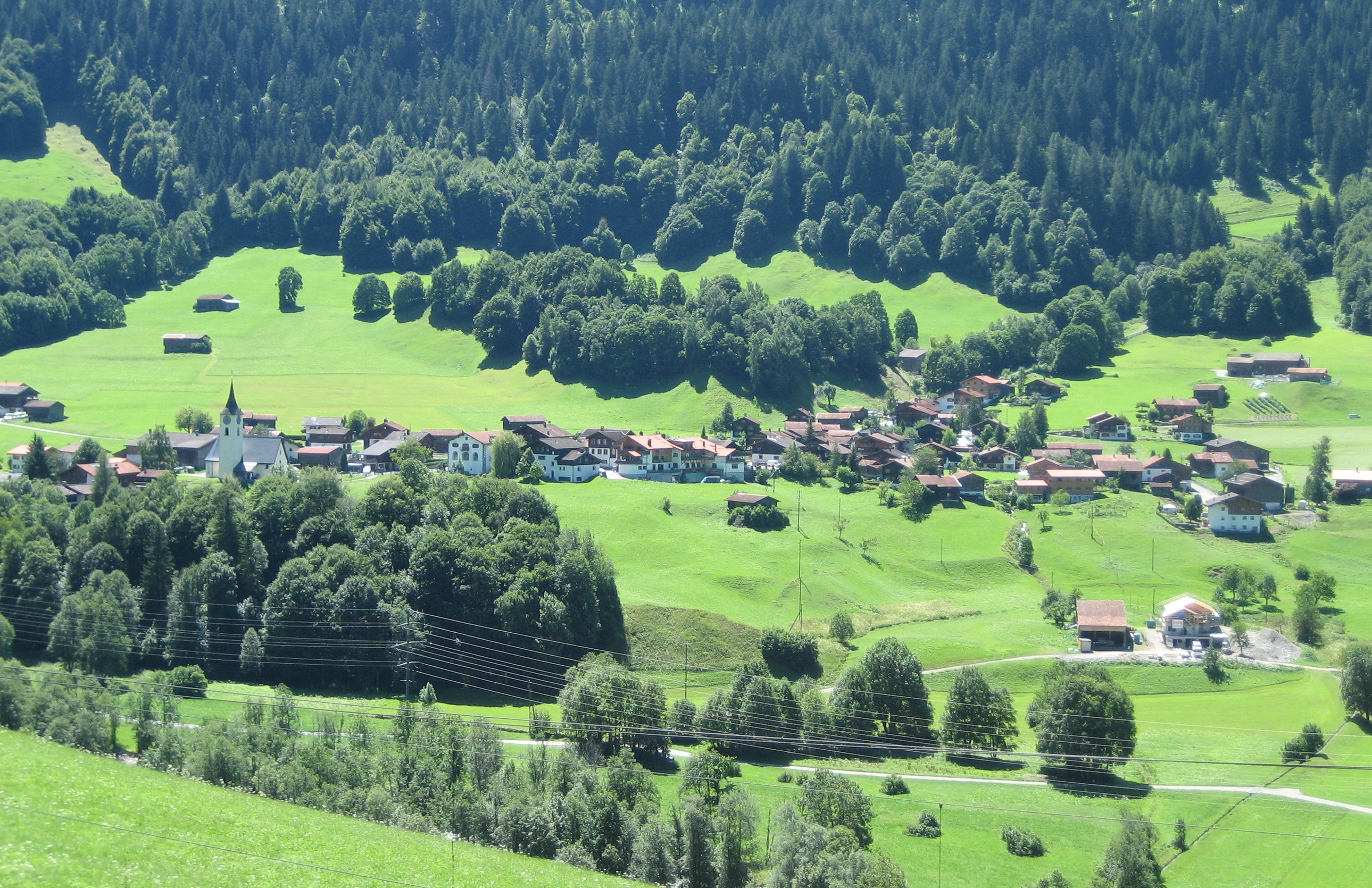 Serneus